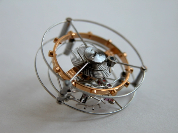 Makro-Aufnahme eines Tourbillon-Käfigs von Frank Jutzi